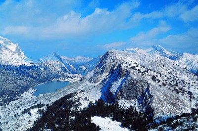 Vista de la Sierra de Tramuntana, Mallorca (España)